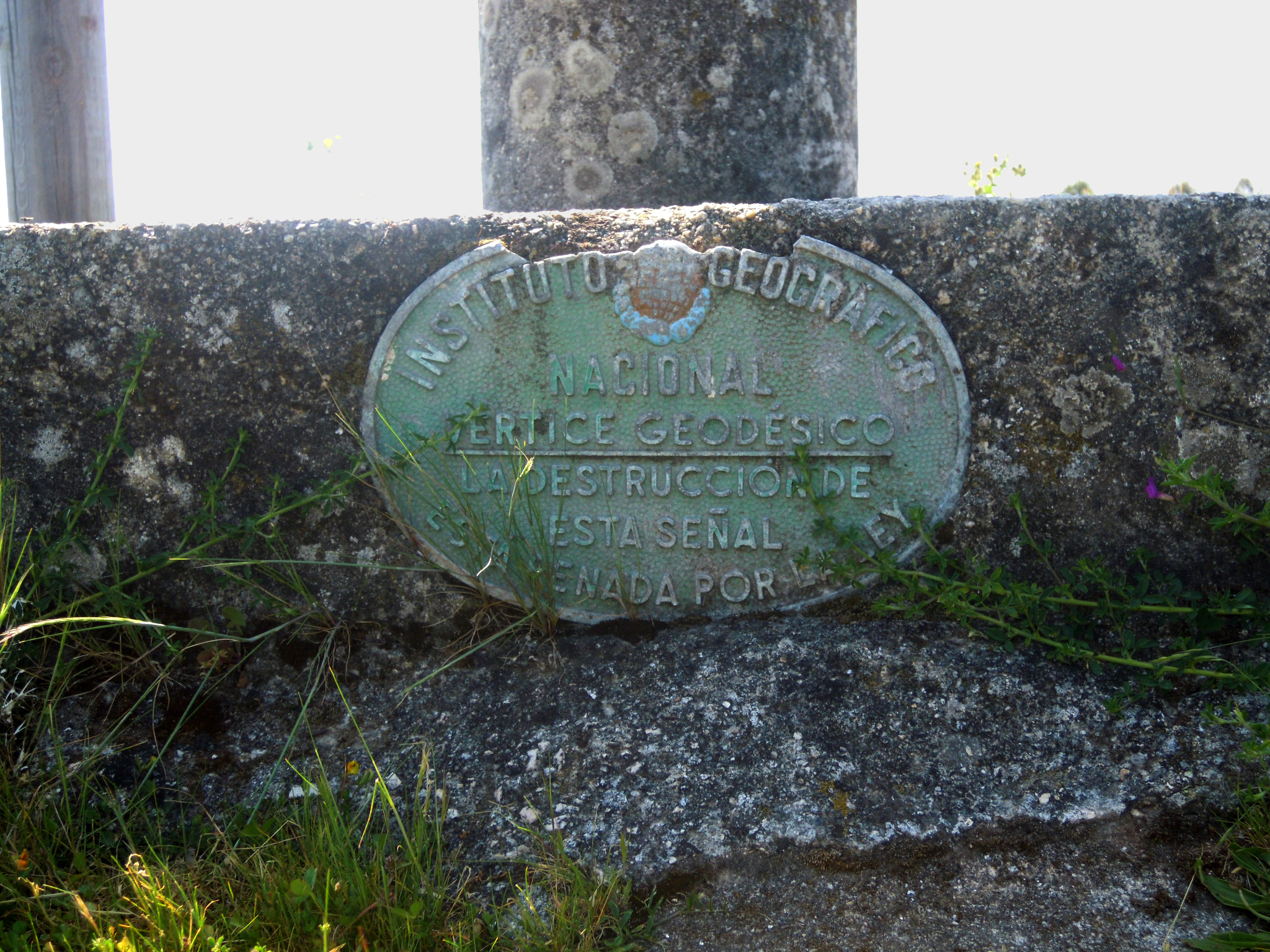 Placa dun vértice xeodésico no monte do Castro (Mourente)